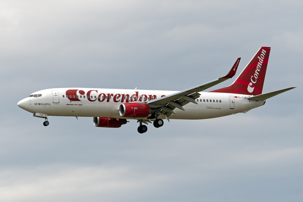 Boeing 737-86J Amsterdam schiphol [AMS / EHAM] 18-05-2012